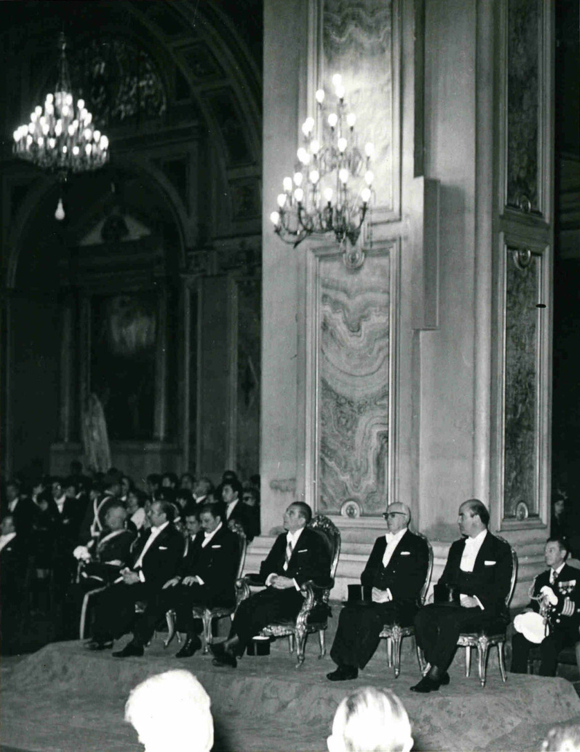 Te Deum Ecuménico de Fiestas Patrias en la Catedral Metropolitana de Santiago, encabezada por el Presidente de la República, don Eduardo Frei Montalva. Durante la ceremonia religiosa encabezada por el Presidente de la República, don Eduardo Frei Montalva, junto a las principales autoridades del país: Alejandro Noemí Huerta (izq.), Presidente del Senado; Ramiro Méndez Brañas (der.), Presidente de la Corte Suprema; Julio Mercado Illanes ( 2º izq.), Presidente Cámara de Diputados y Patricio Rojas Saavedra (2º der.), Ministro del Interior.